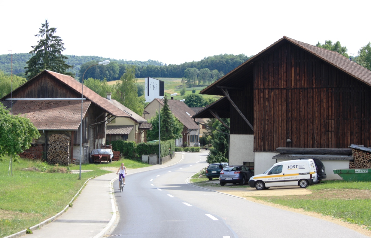 Blick auf Zeihen